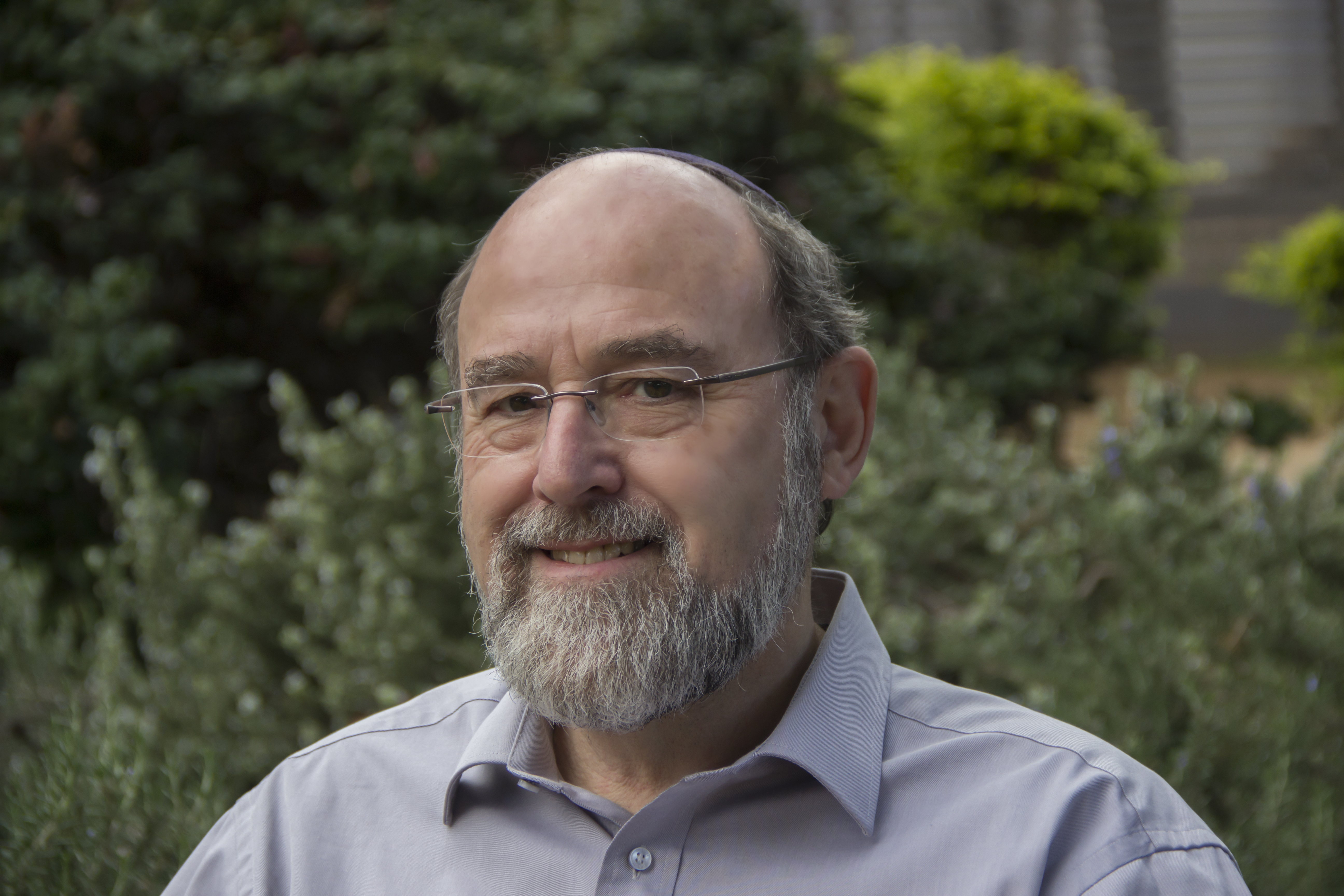 דויד לייזר